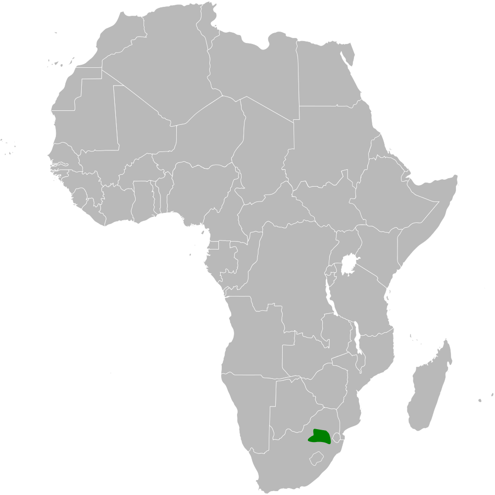 Spizocorys fringillaris distribution map; using BlankMap-Africa.svg, based on